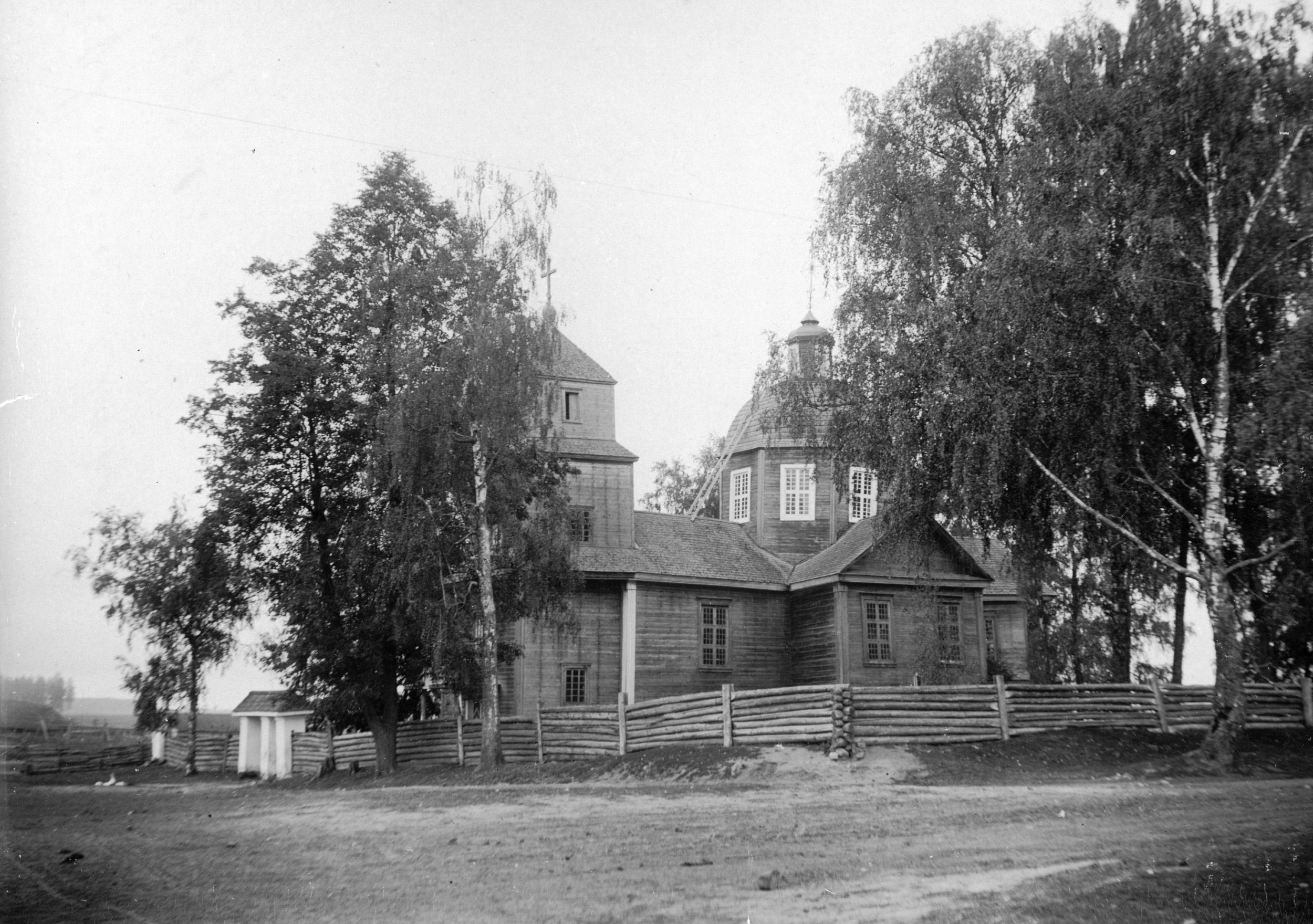 Беларуская (тарашкевіца): Порплішча (Porplišča). Царква Сьвятога Спаса